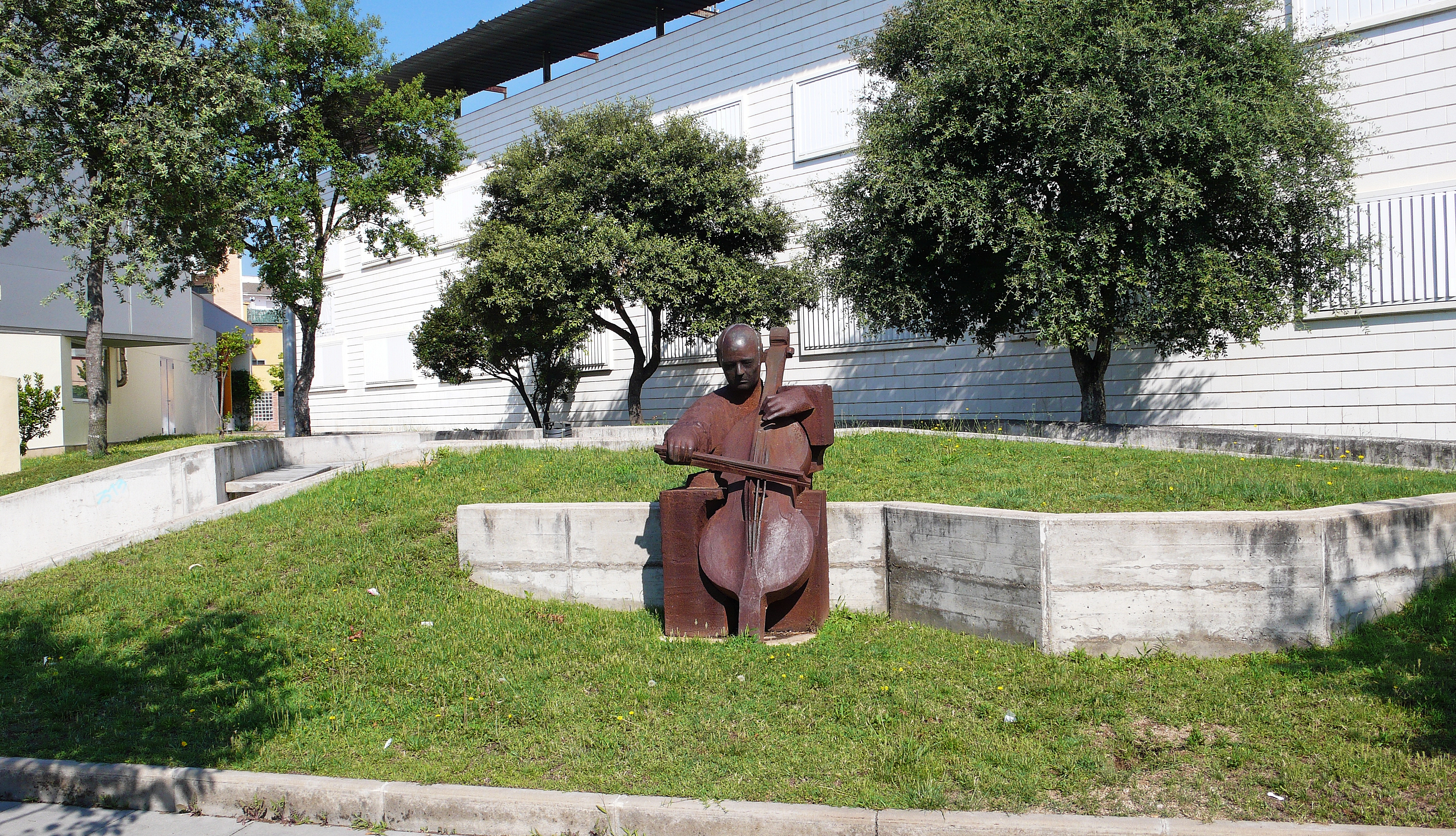 monumento a Pau Casals-tordera 2014